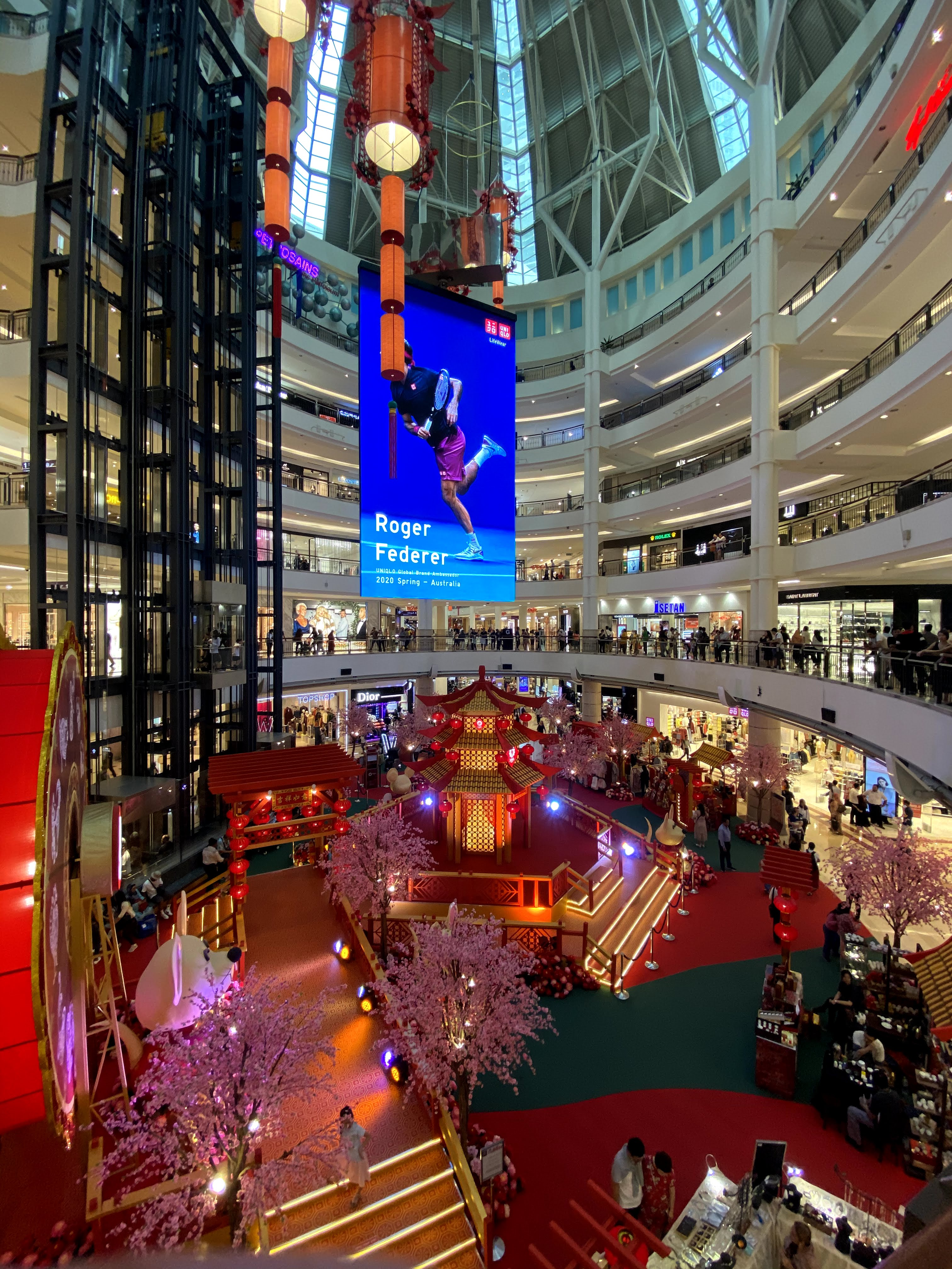 中文（台灣）: 吉隆坡陽光廣場中庭